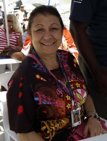 Presidente da Rosas de Ouro Angelina Basílio na apuração em 2010.